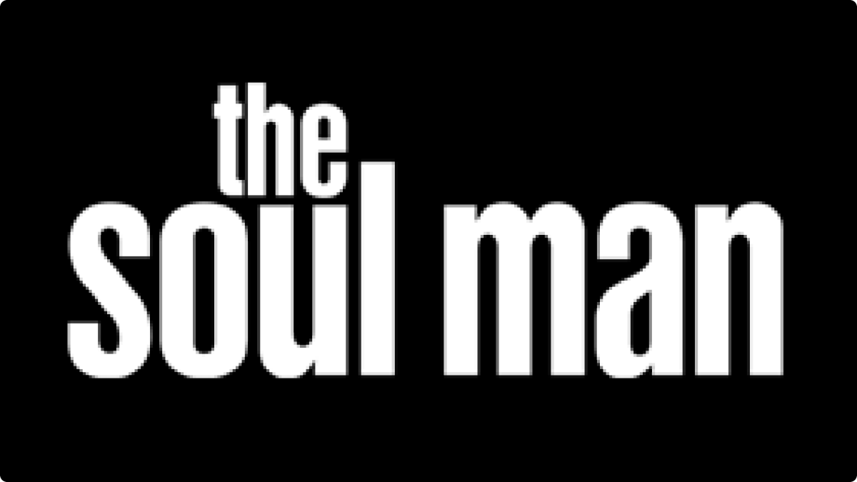 Diese Grafik zeigt das Logo der TV Serie The Soul Man